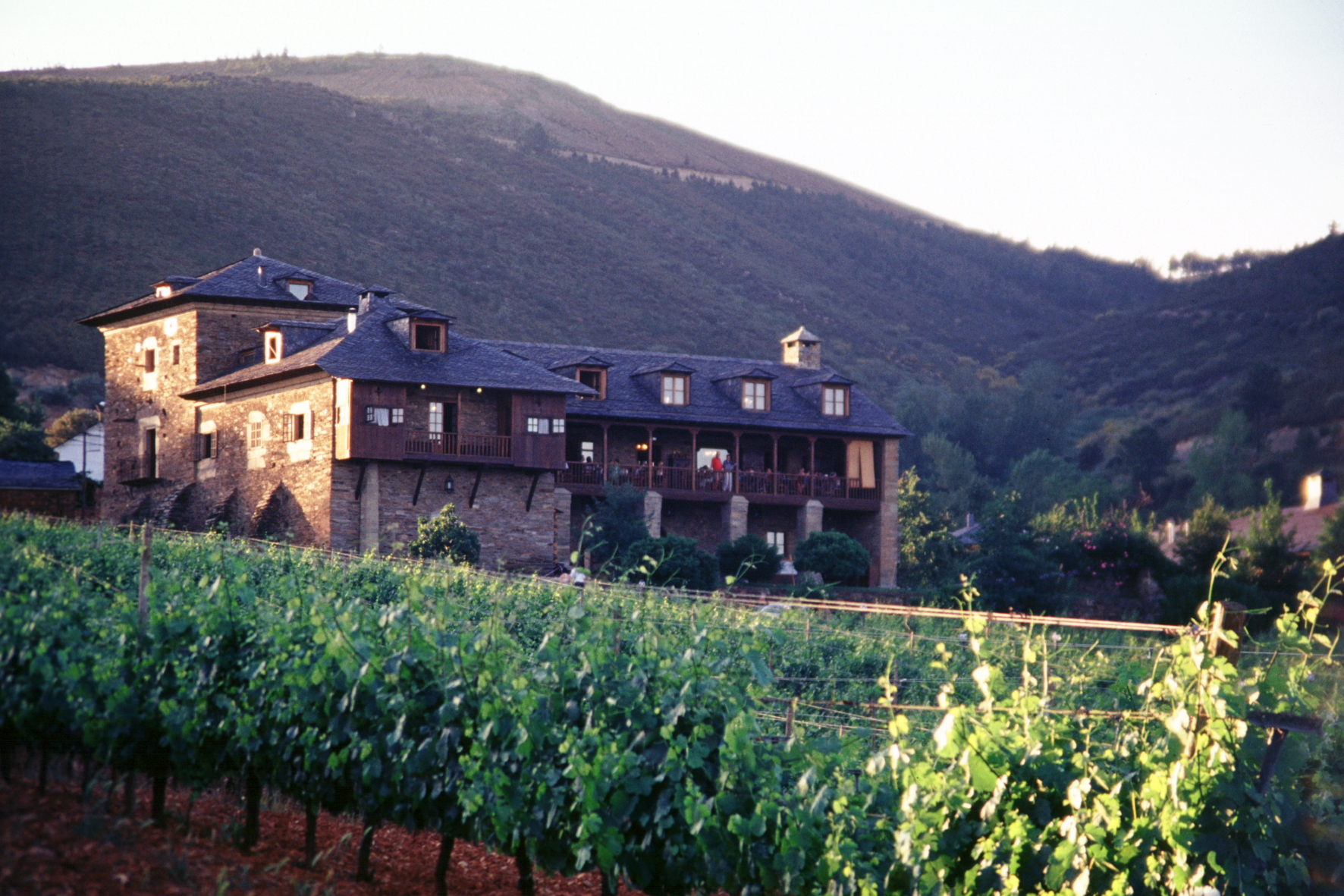 Palacio de Canedo, Arganza (León)